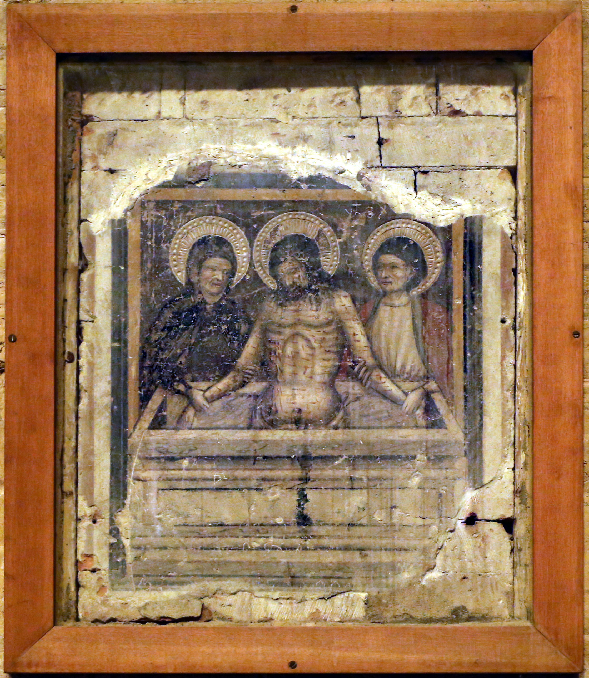 abbazia di San Mercuriale This is a photo of a monument which is part of cultural heritage of Italy.